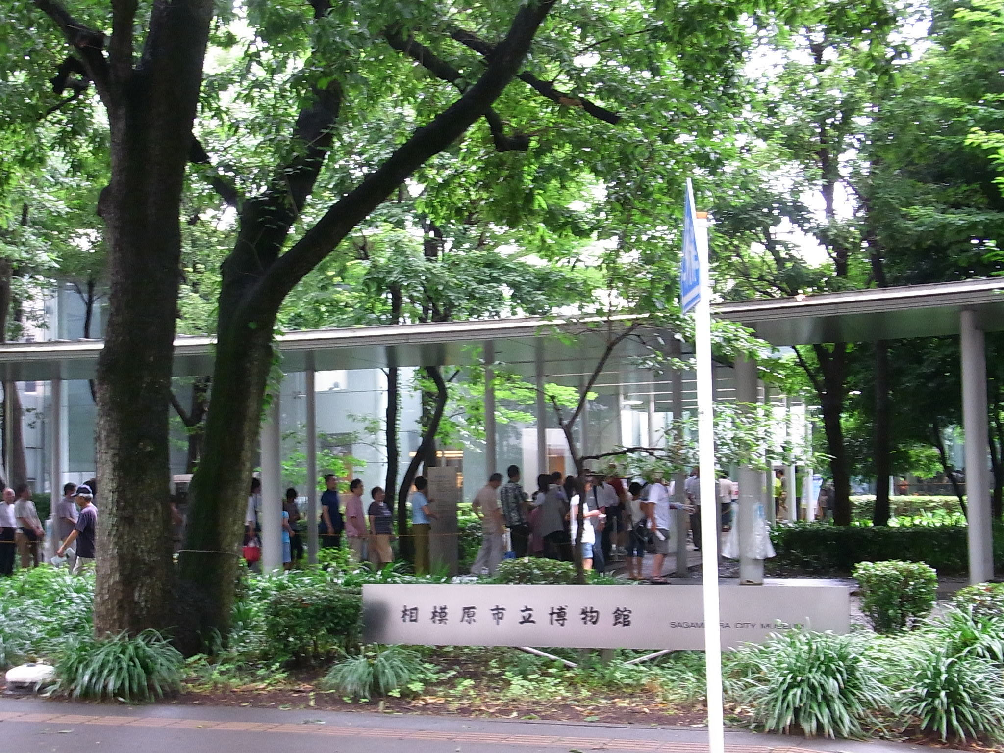 探査機「はたぶさ」